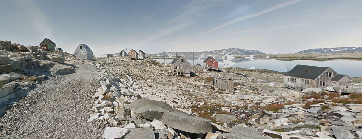 Isortoq